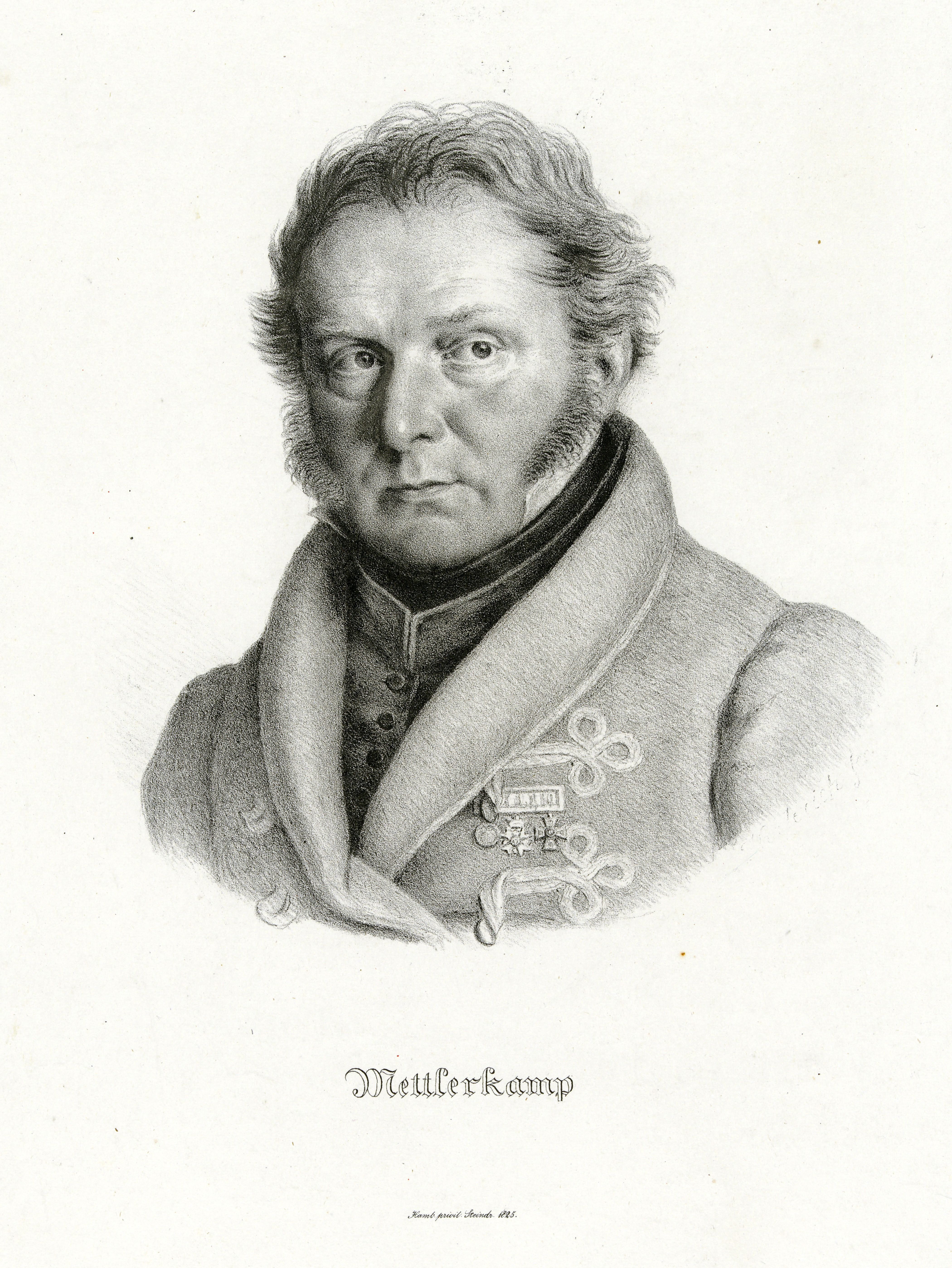 Mettlerkamp